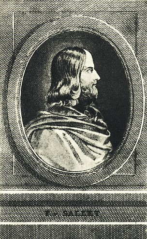 Portrait des Dichters Friedrich von Sallet.